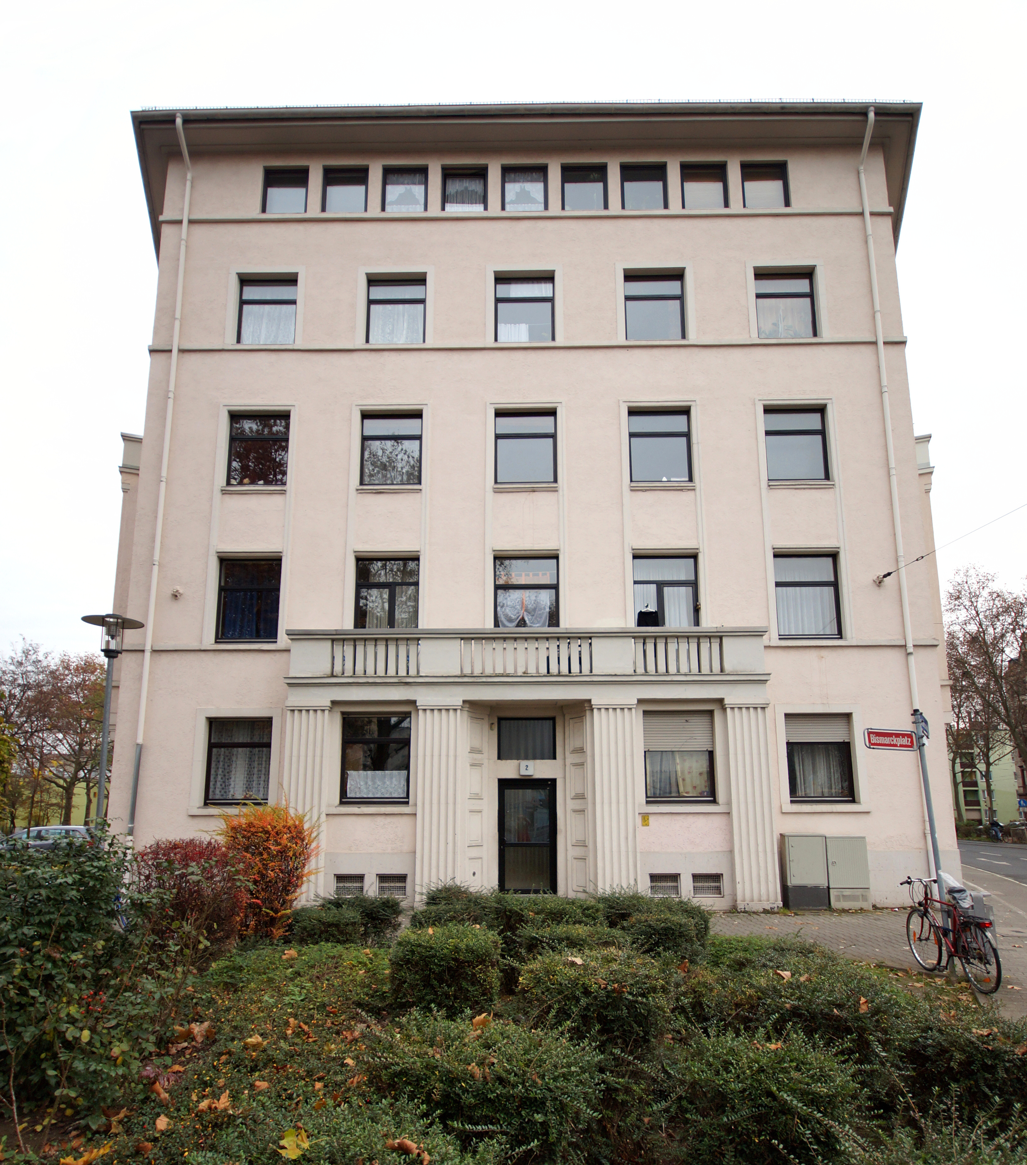 Die Fassade des Bismarckplatzes 2 am Bismarckplatz in Mainz-Neustadt